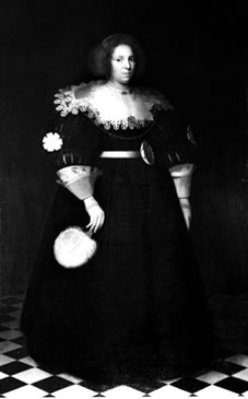 Maria Overlander (1603-1678), vrouwe van Purmerland en Ilpendam